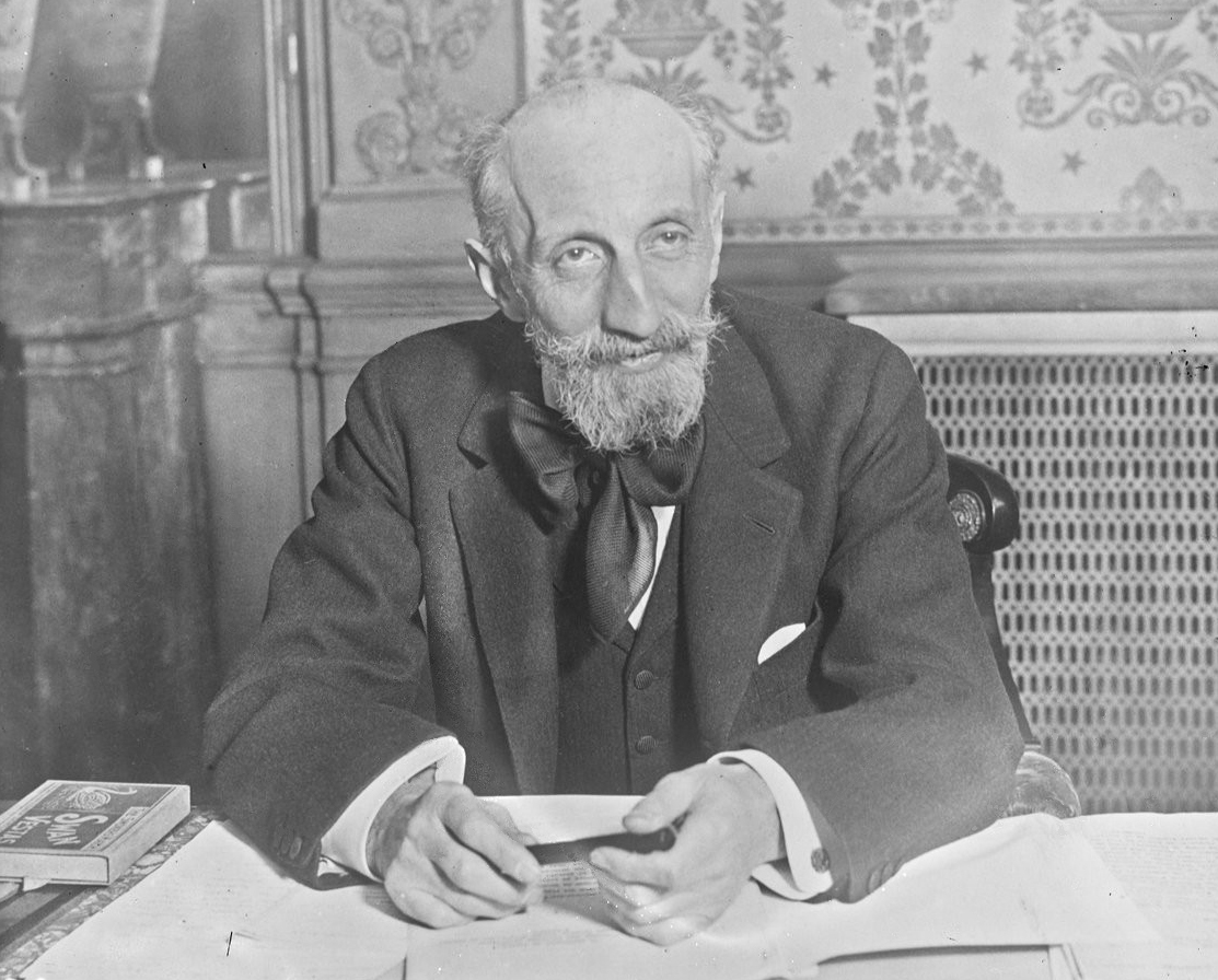 Agence Rol - Aimé Joseph de Fleuriau en 1924